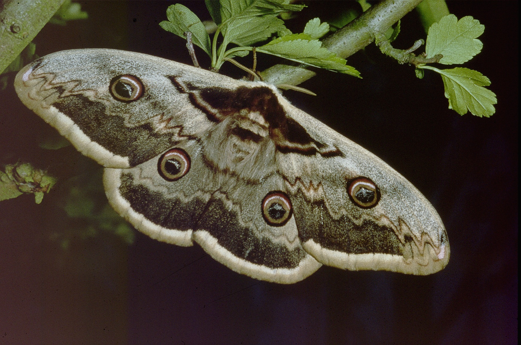 Je suis l'auteur de ce cliché (phototèque personnelle) réalisé en Basse-Normandie France, émergence en cage d'élevage depuis un cocon d'origine non précisée mais probablement Touraine ou Bass-Normandie France la libération de l'imago permit ce cliché. Nous y voyons un Saturnia Pyri Femelle.